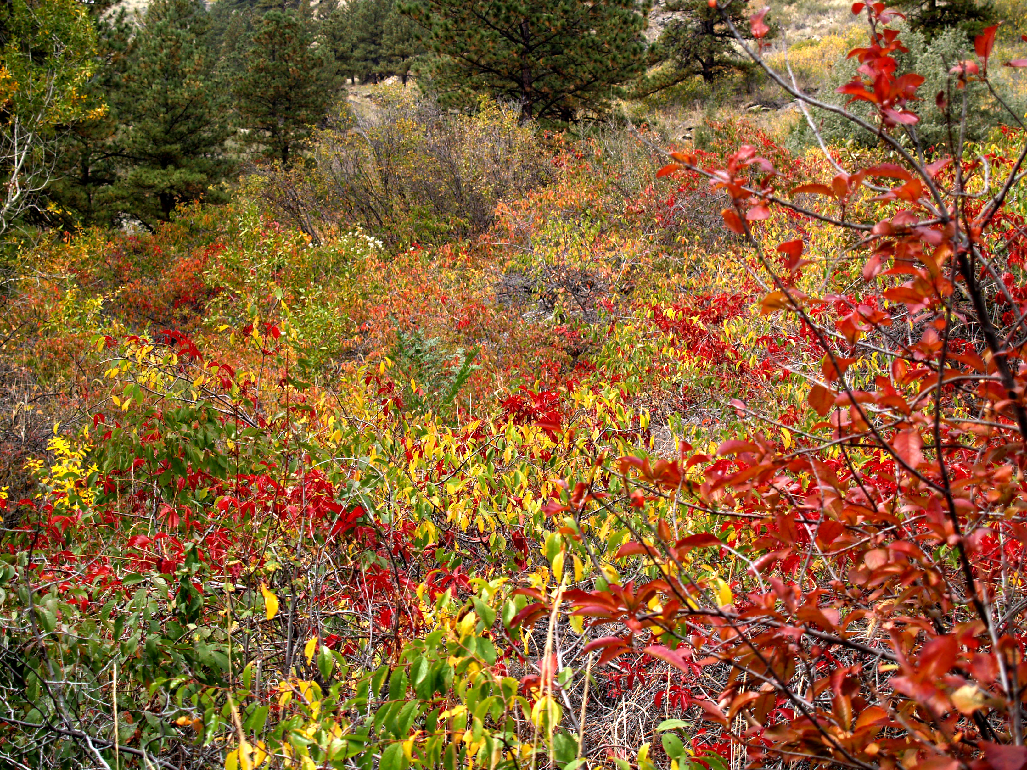 Fall colors, Poudre Canyon, Colorado